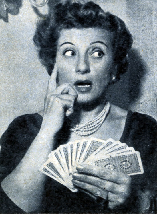 photo from magazine Radiocorriere (1954)